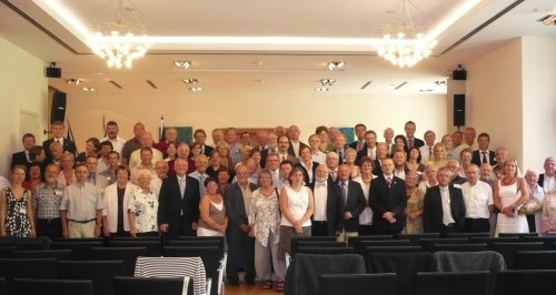 Gruppenfoto des Deutsch-Belgischen Partnerstädte-Tages am 29.06.2009 in Brüssel